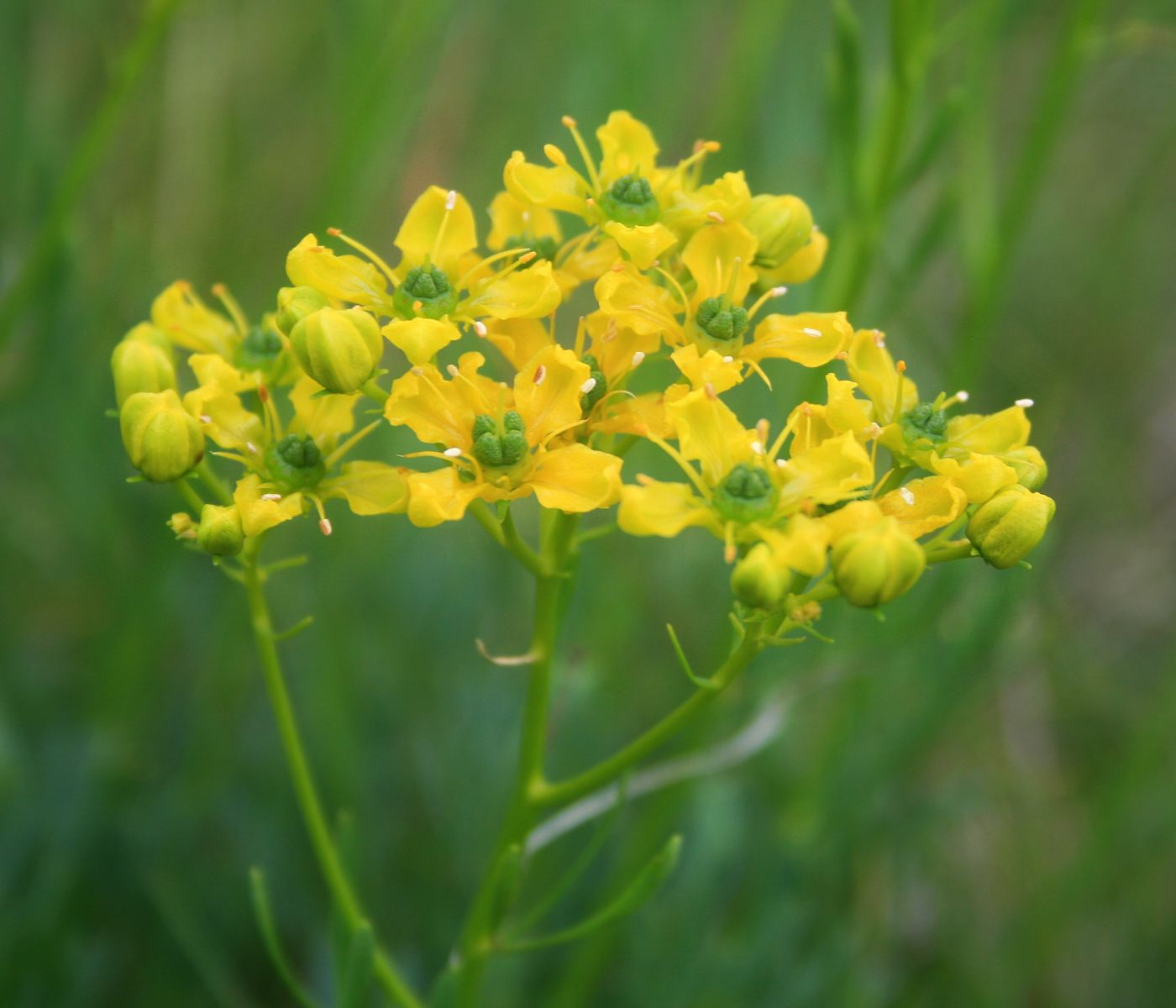 Wein-Raute (Ruta graveolens), Rautengewächse (Rutaceae) - Slowenien/Slovenija/Slovenia: Primorska, N Podgorje